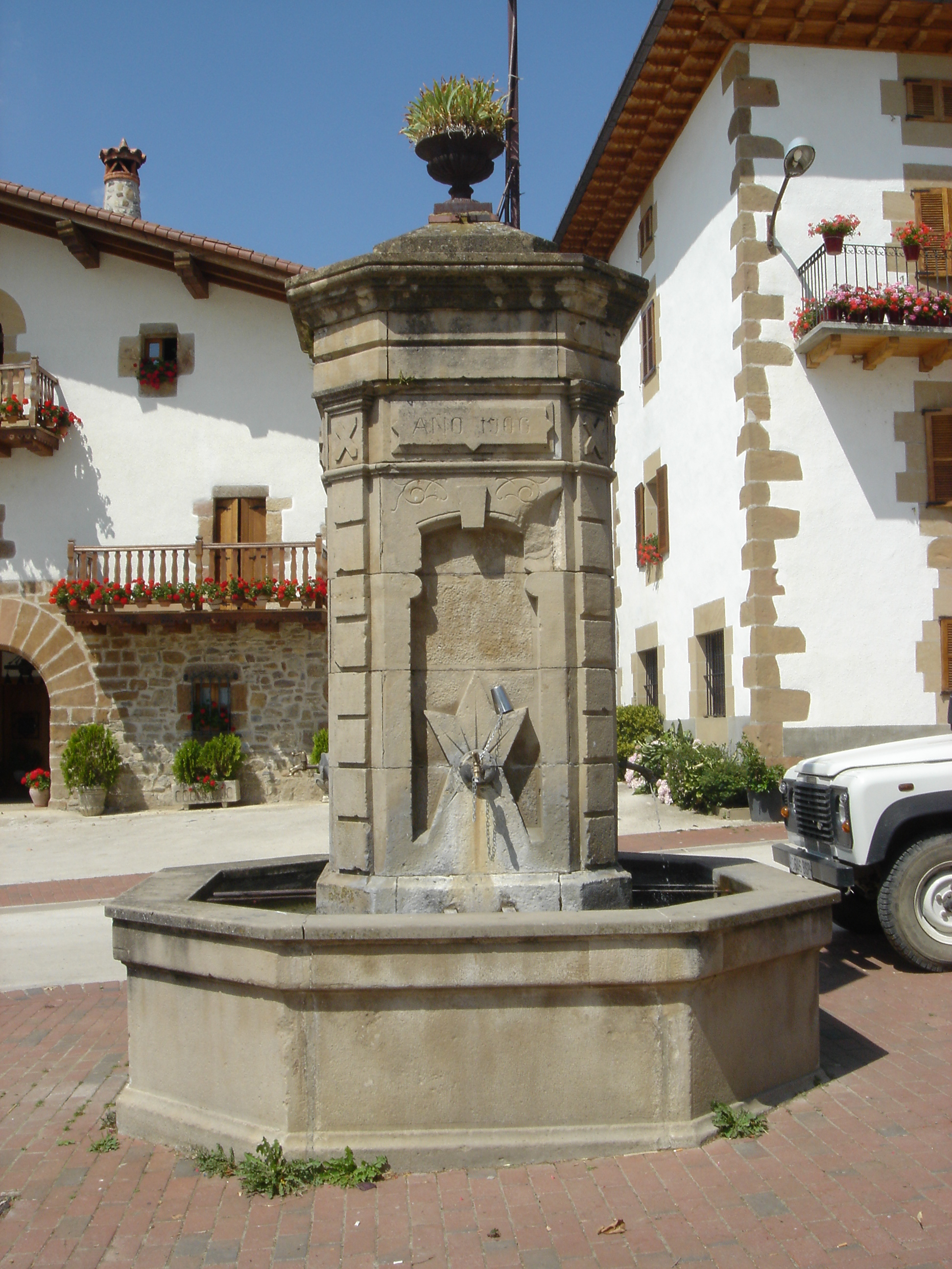 Fuente en la plaza de Iráizoz